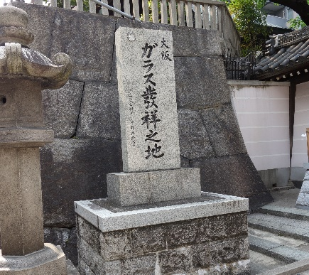 大阪の天満にある大阪ガラス発祥の地の碑です。 撮影者：Japanese Style Production 撮影日：2018/04 撮影場所：大阪天満宮正面西側